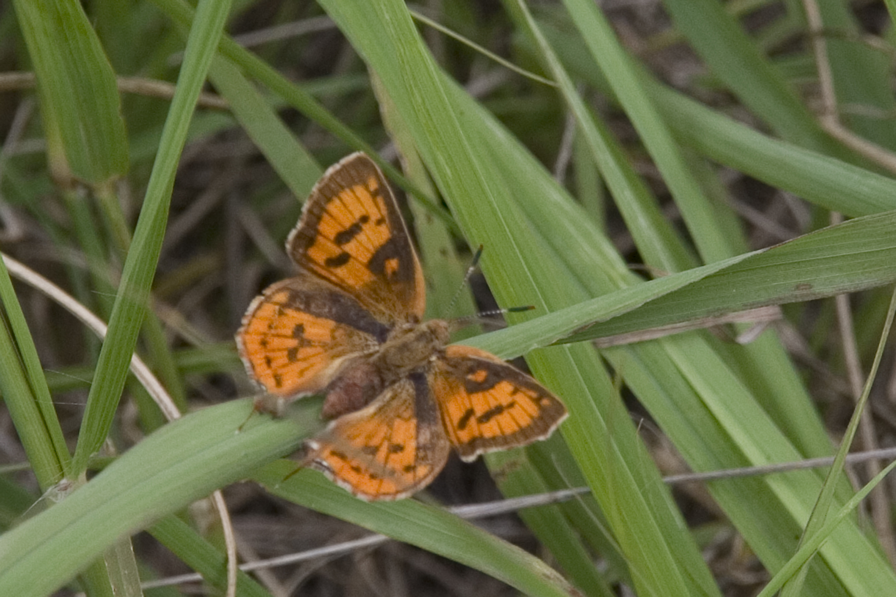 Axiocerses tjoane, Common scarlet / ralierooivlerkie, female, (Wallengren, 1857)